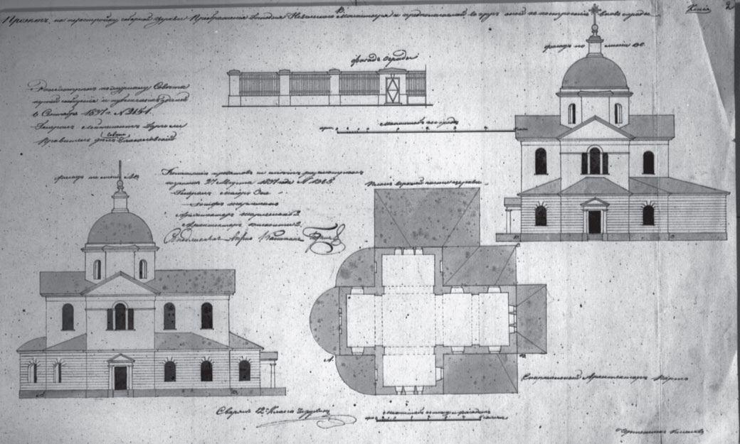 Беларуская (тарашкевіца): Невель (Nieviel), вуліца Замкавая (vulica Zamkavaja). Царква Сьвятога Спаса